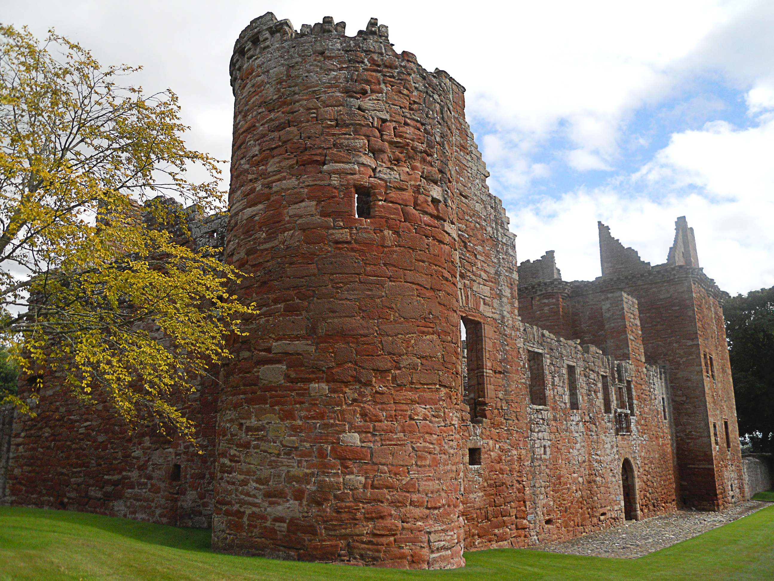 Edzell Castle